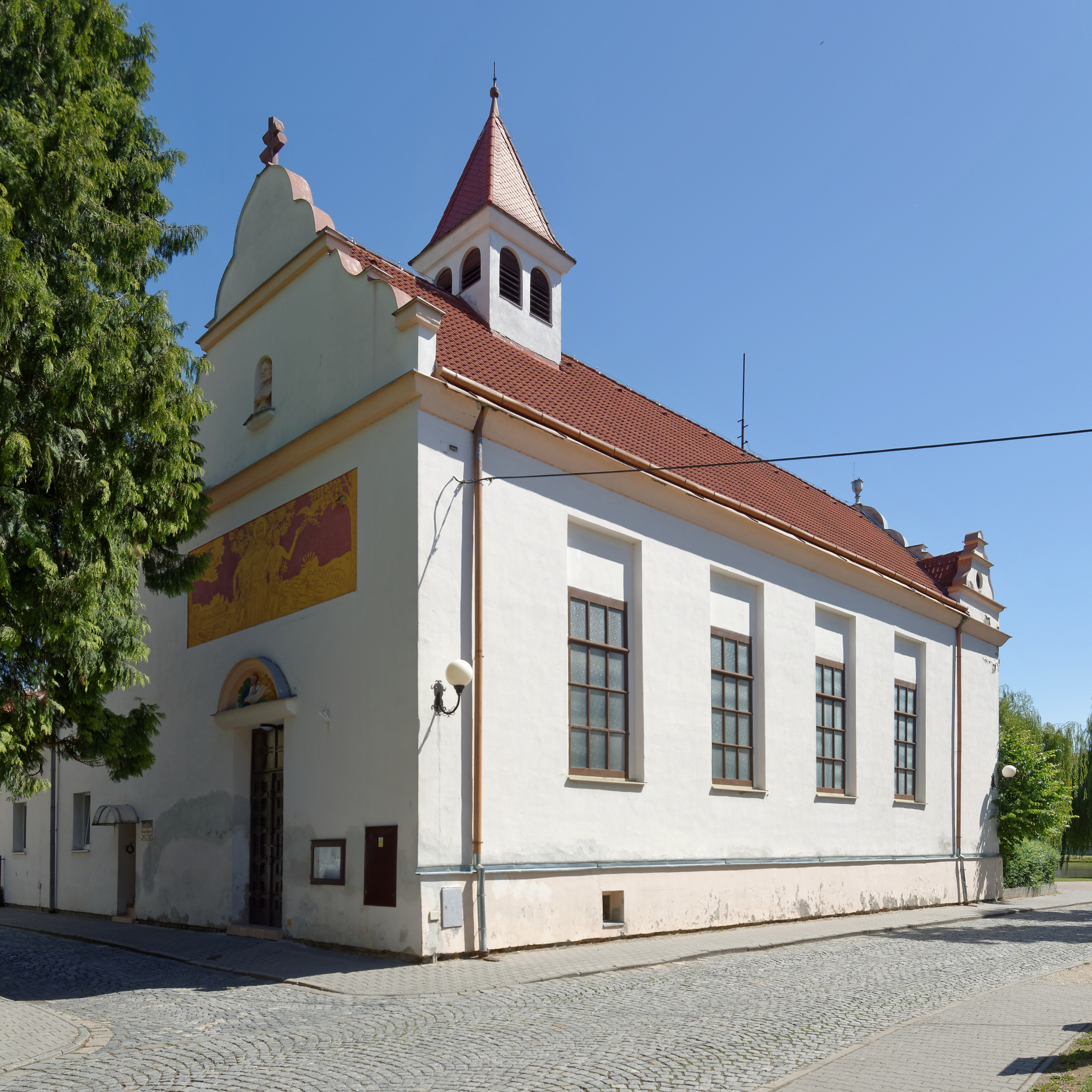 Litovel, Husova ulice, Husův sbor, pohled od jihozápadu. Autorem sgrafita nad vchodem je František Doubrava.